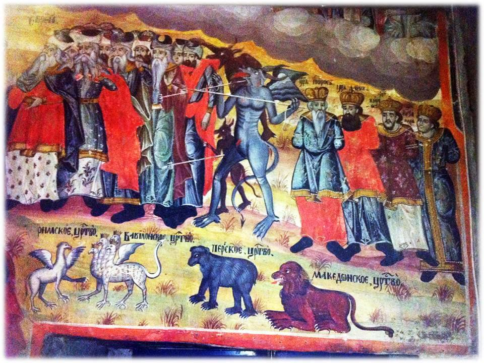 Александар Македонски прикажан на фрескопис во црквата „Св.Великомаченик и Победоносец Ѓоргија“ од XVI век, во селото Бањани кое се наоѓа во подножјето на Скопска Црна Гора.